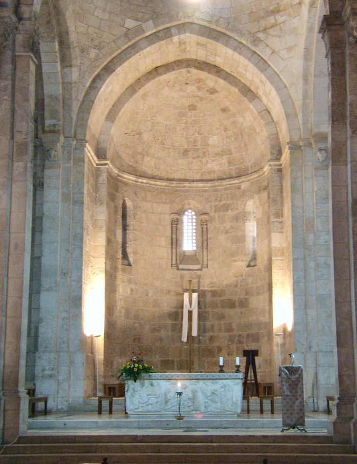 Church of St Anne, St. Anna-Kirche in Jerusalem